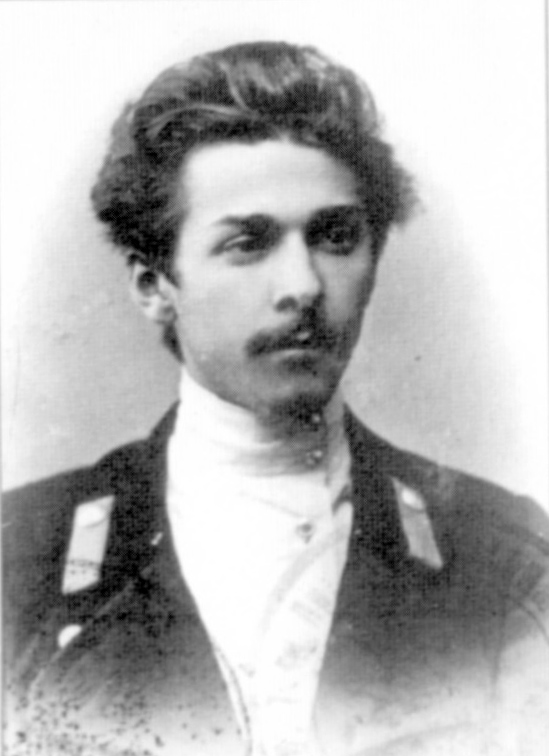 Павло Тичина